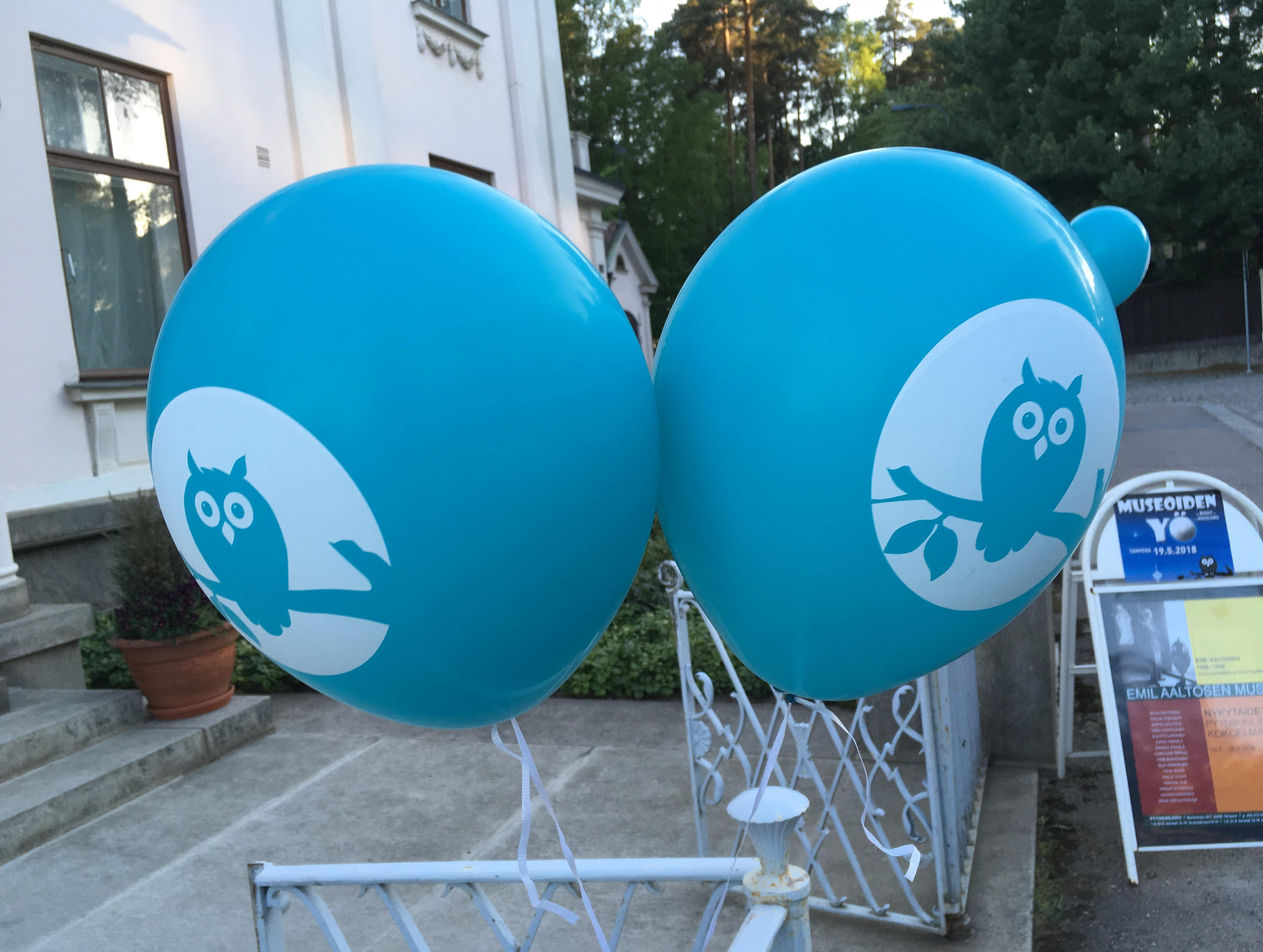 Museoiden yö -tapahtuman mainosilmapalloja Pyynikinlinnan eli Emil Aaltosen museon edustalla